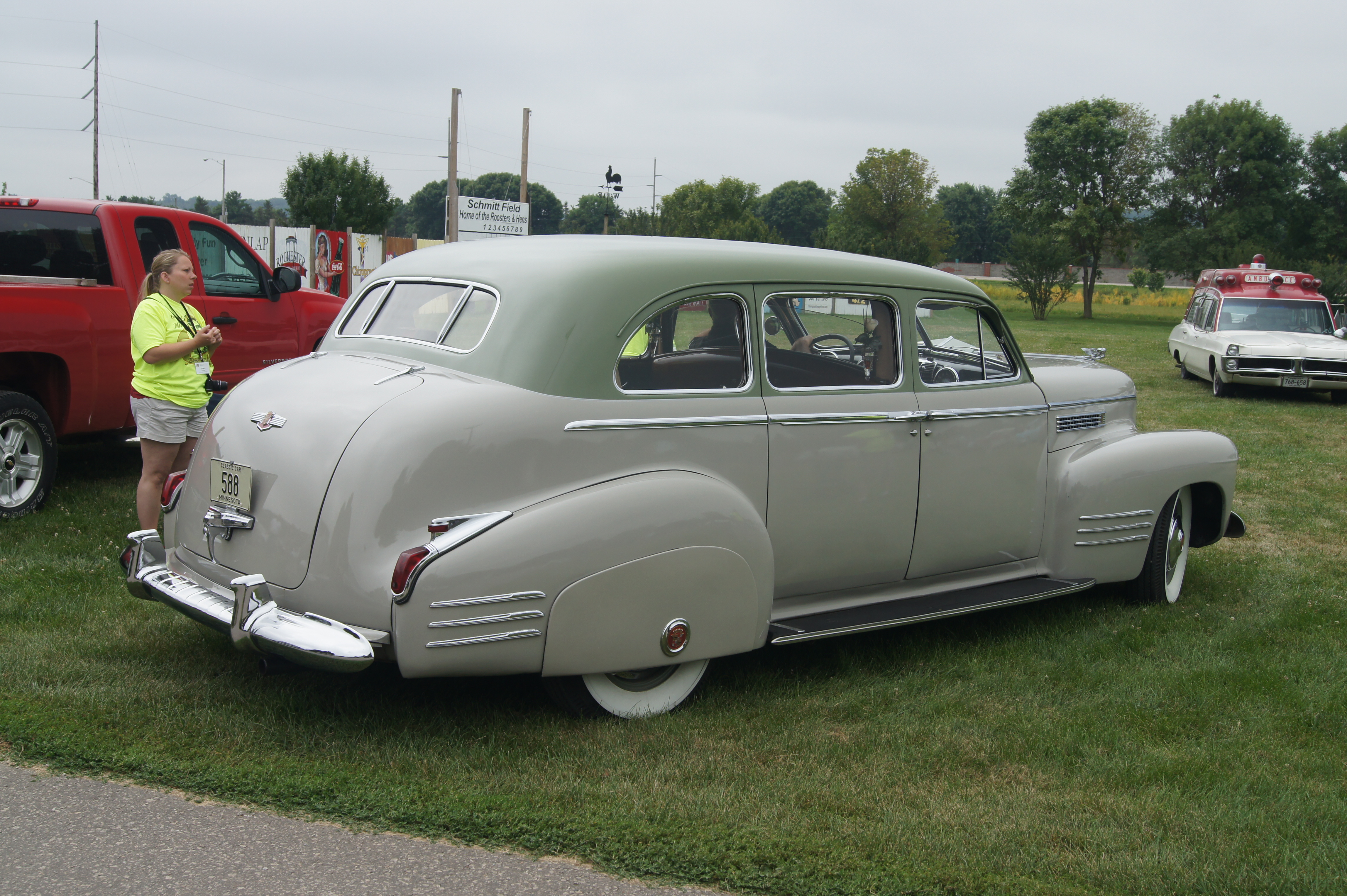 1941 Cadillac Series 75 limousine